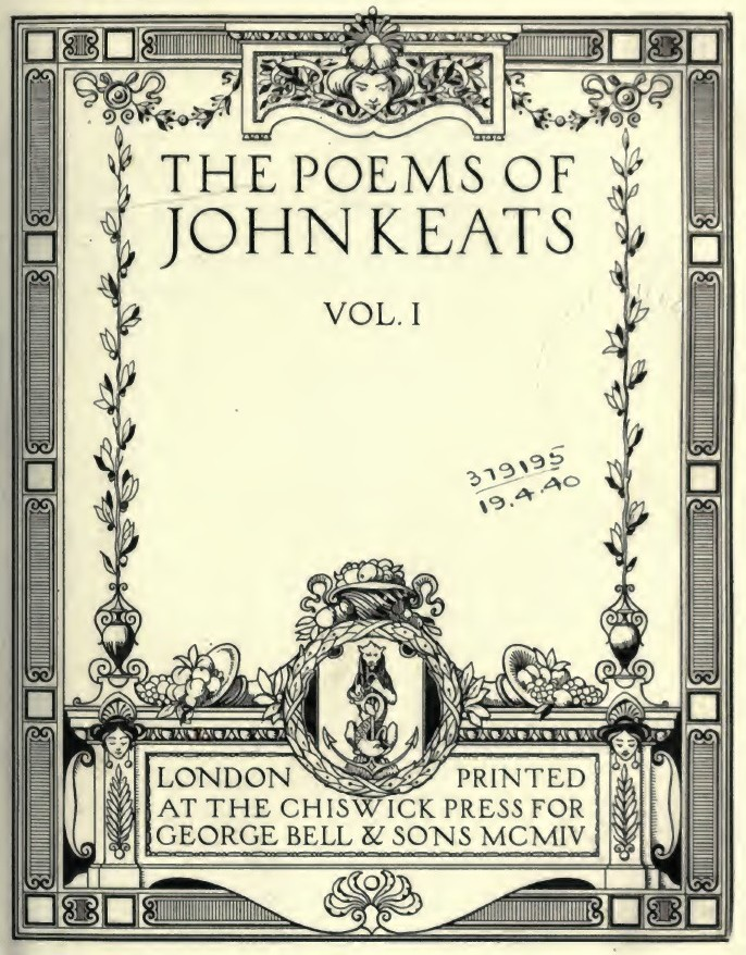 The Poems. 1 / of John Keats ; [edited by George Sampson]. - London : printed at the Chiswick Press for George Bell & Sons, 1904. - vii, 207 p. . Frontespizio